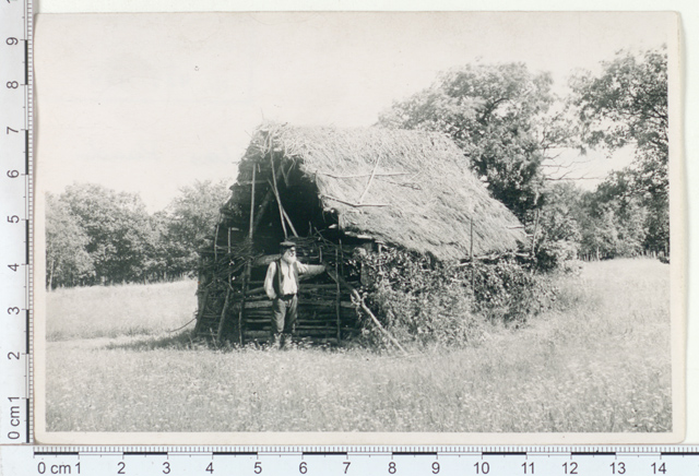 Heinaladu Ajaotsa külas Randveres, Jõelähtme khk